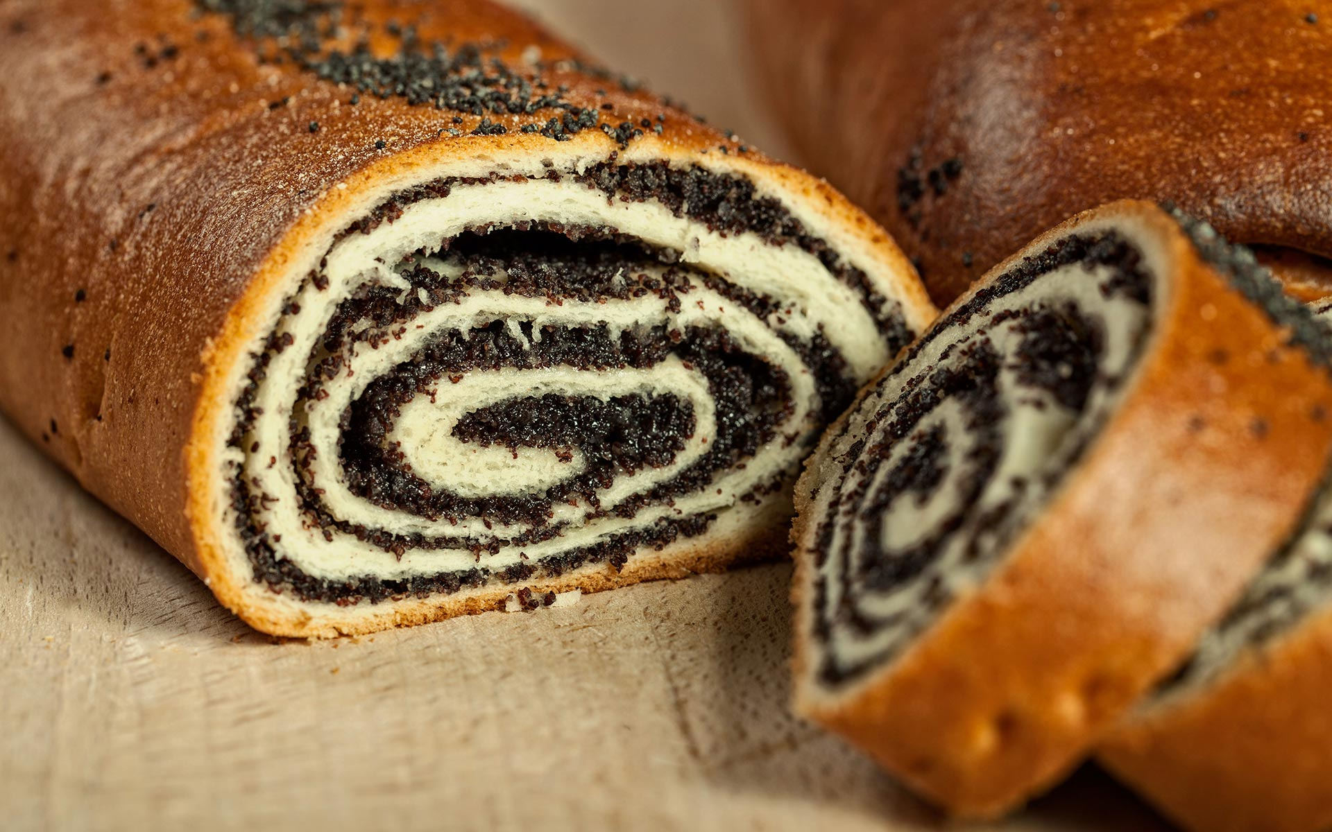 Найпоширеніший козонак - козонак з маком.